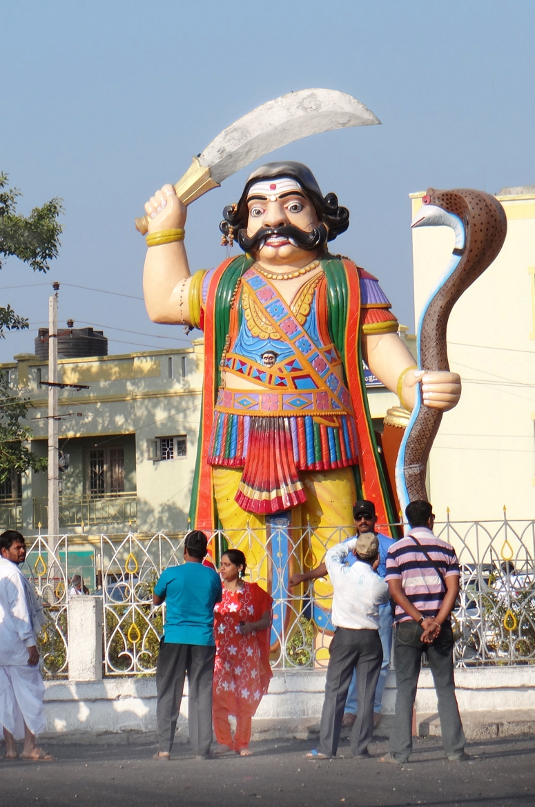 Statue du démon-buffle Mahishâsura à l'entrée du temple de Chamundi, sur la colline dominant la ville de Mysore C'est la déesse Durga, appelé Chamundi et célébrée à Mysore qui a vaincu le démon-buffle Mahishâsura (IAST: mahiṣāsura, devanagari: महिषासुर) est un démon-buffle de la mythologie hindoue. Il était le produit des amours du roi des asuras Rambha avec une bufflonne (qui était en réalité une princesse victime d'une malédiction) et pouvait prendre aussi bien l'apparence d'un buffle que d'un être humain (mahisha signifie buffle). Il fut tué par la redoutable déesse Durga, manifestation tueuse de démons de Devi. Il a donné son nom à la ville de Mysore. Extrait de l'article de Wikipedia